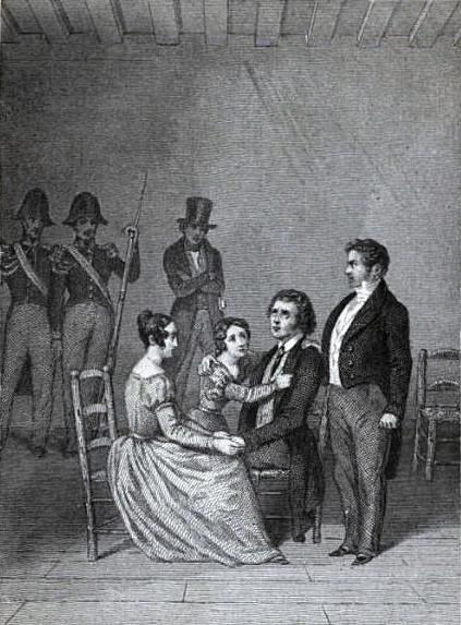 22 janvier 1824 : Visite de la famille d'Andryane à ce dernier, incarcéré à Sainte-Marguerite. De gauche à droite, au premier plan : Pauline Andryane (fille de Merlin de Douai), Louise (fille de Louis Simon et Pauline Andryane), Alexandre Andryane et Louis Simon Andryane (frère d'Alexandre). A l'arrière plan : le chef du bureau de police, Cardani, et des gendarmes.